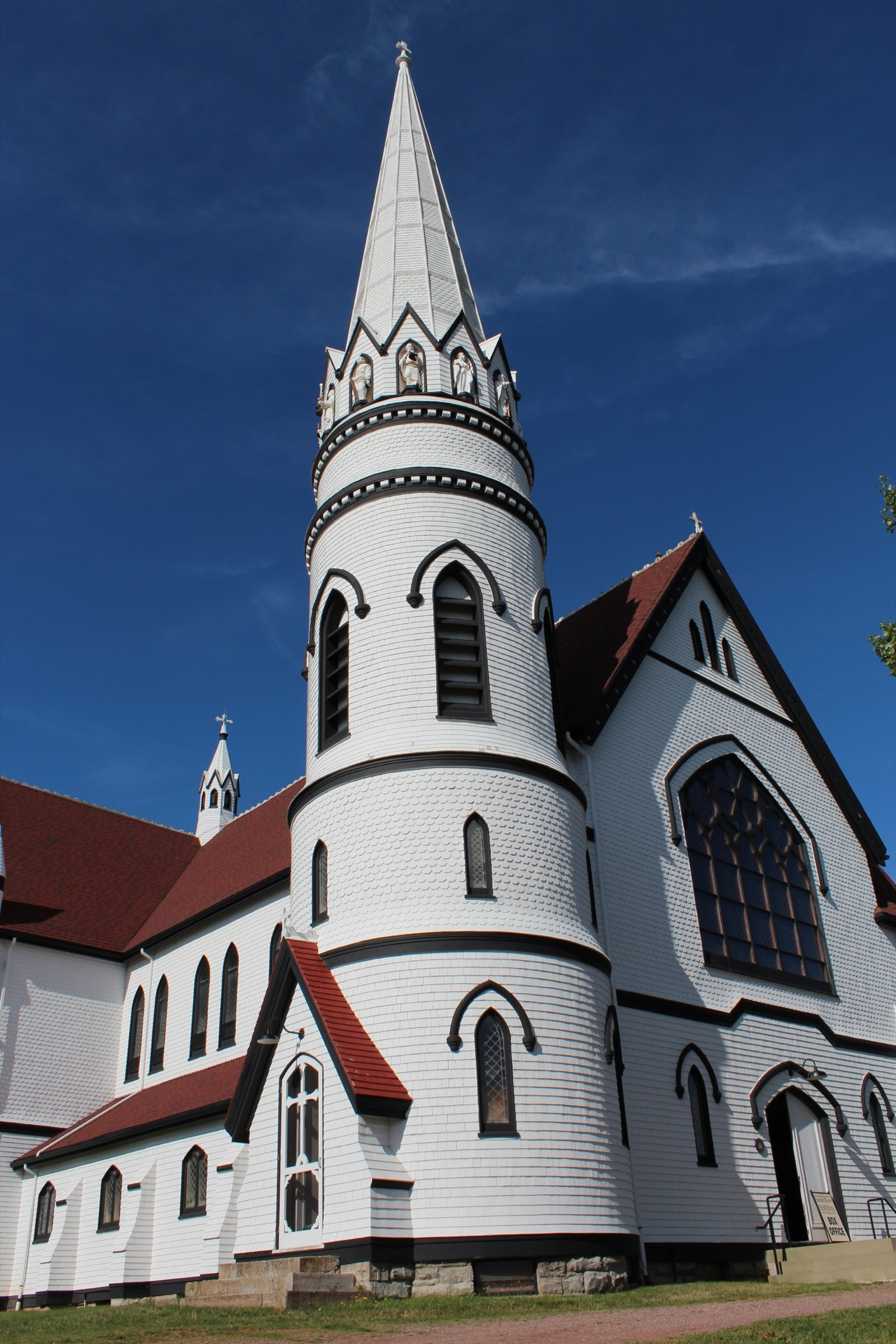 St. Mary's Church, Indian River, 1374 Hamilton Road, Route 104, Indian River (Canada). (Protection Registered Historic Place. Voir la liste des lieux patrimoniaux de l'Île-du-Prince-Édouard pour plus de détails).